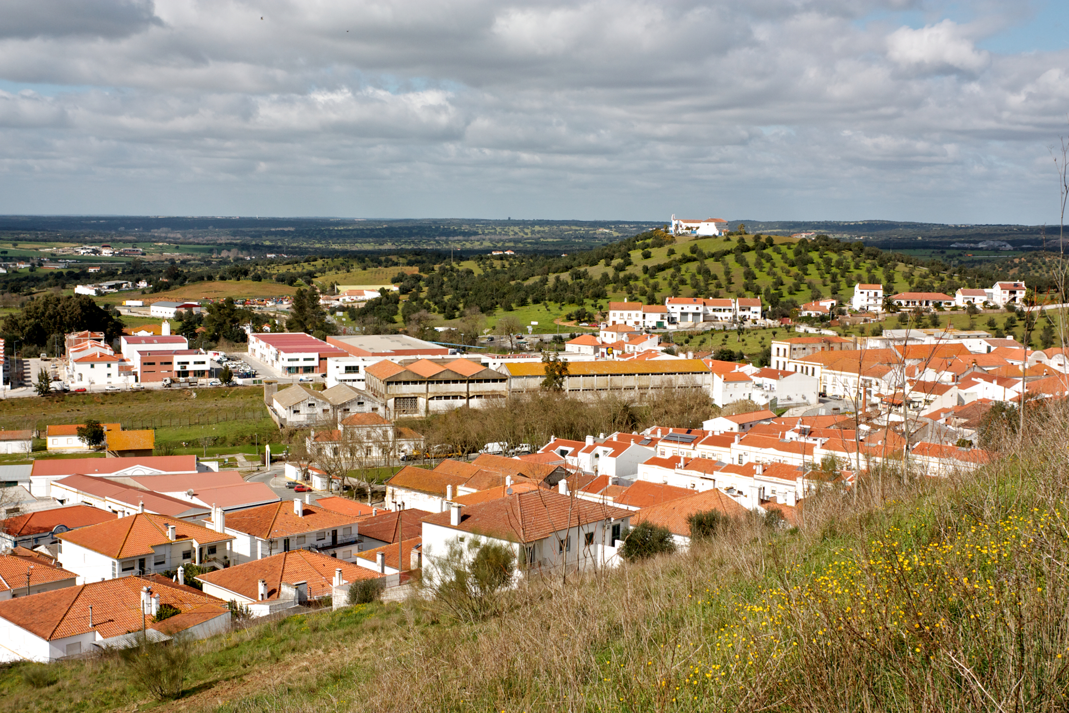 hoje, parte integrante (mas ainda não recuperada) da Ecopista do Montado . Tipo: E [Estação] Local: Montemor-o-Novo [ Ramal de Montemor , PK 88] Data e hora: 22 de Fevereiro de 2011 [13h11]